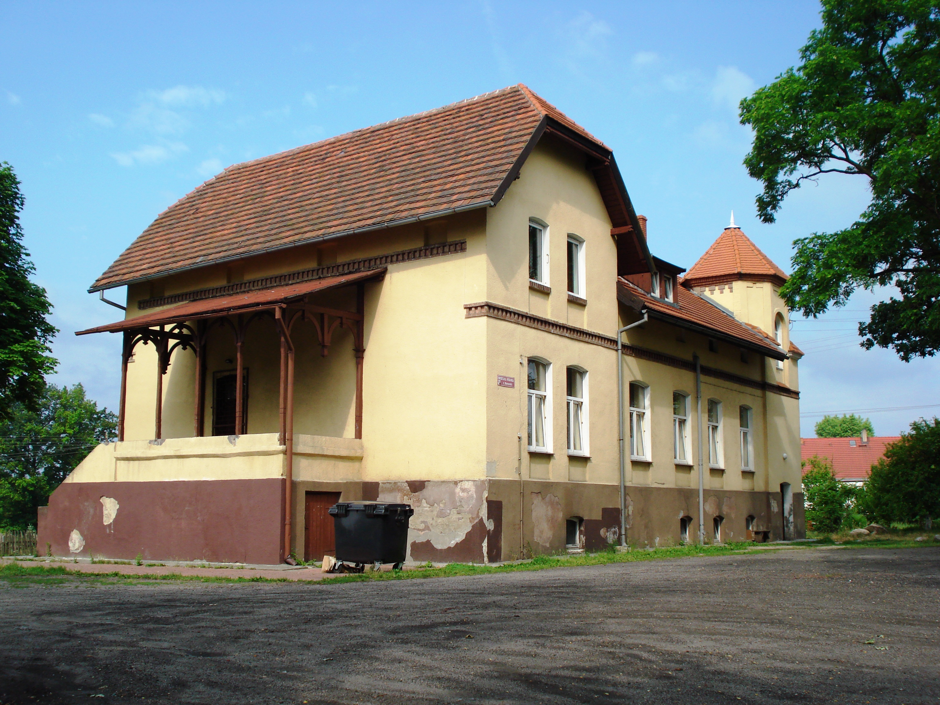 Świetlica wiejska w Marszowie.